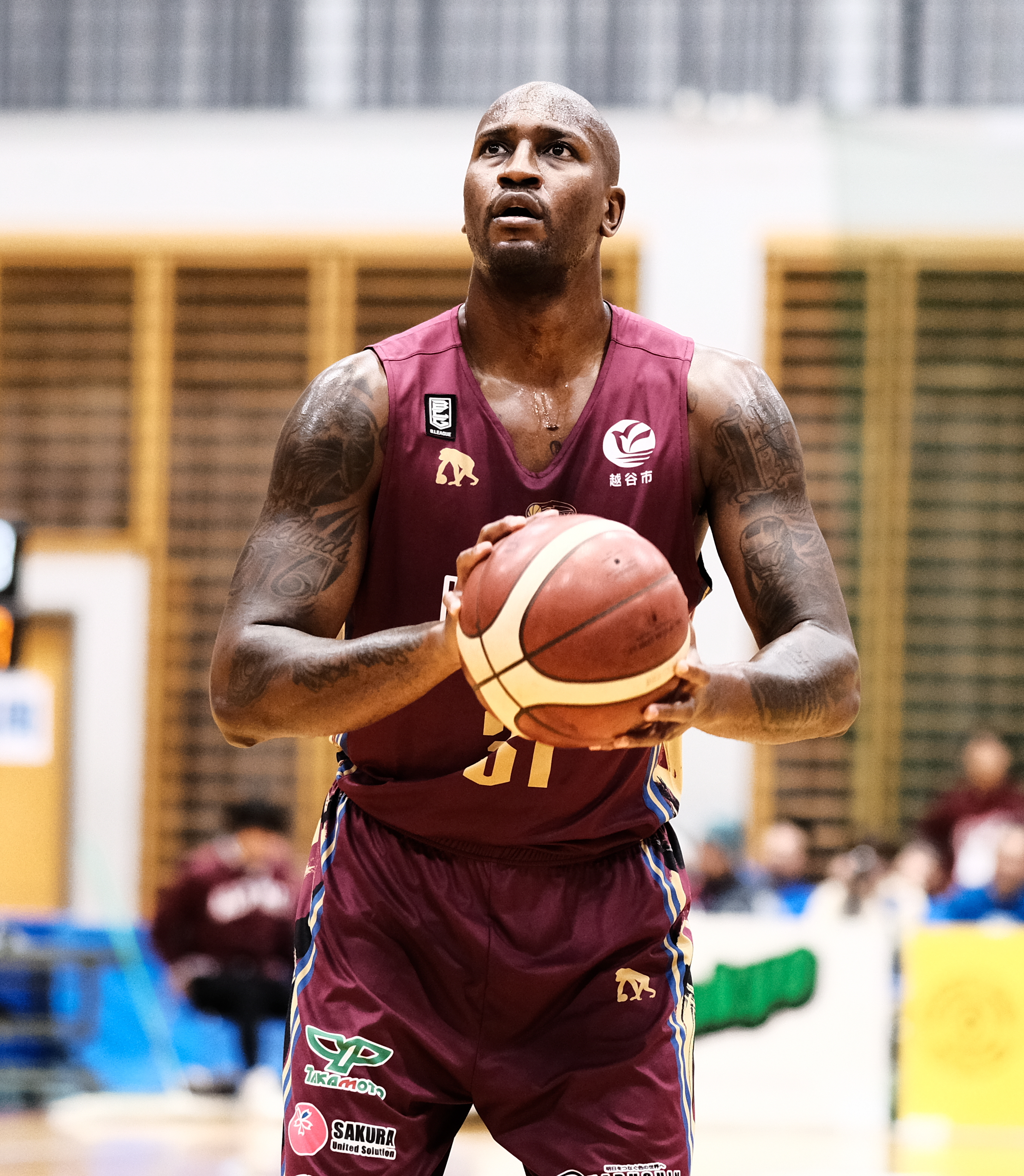 20191123 11月23日 越谷アルファーズ vs ライジングゼファー福岡